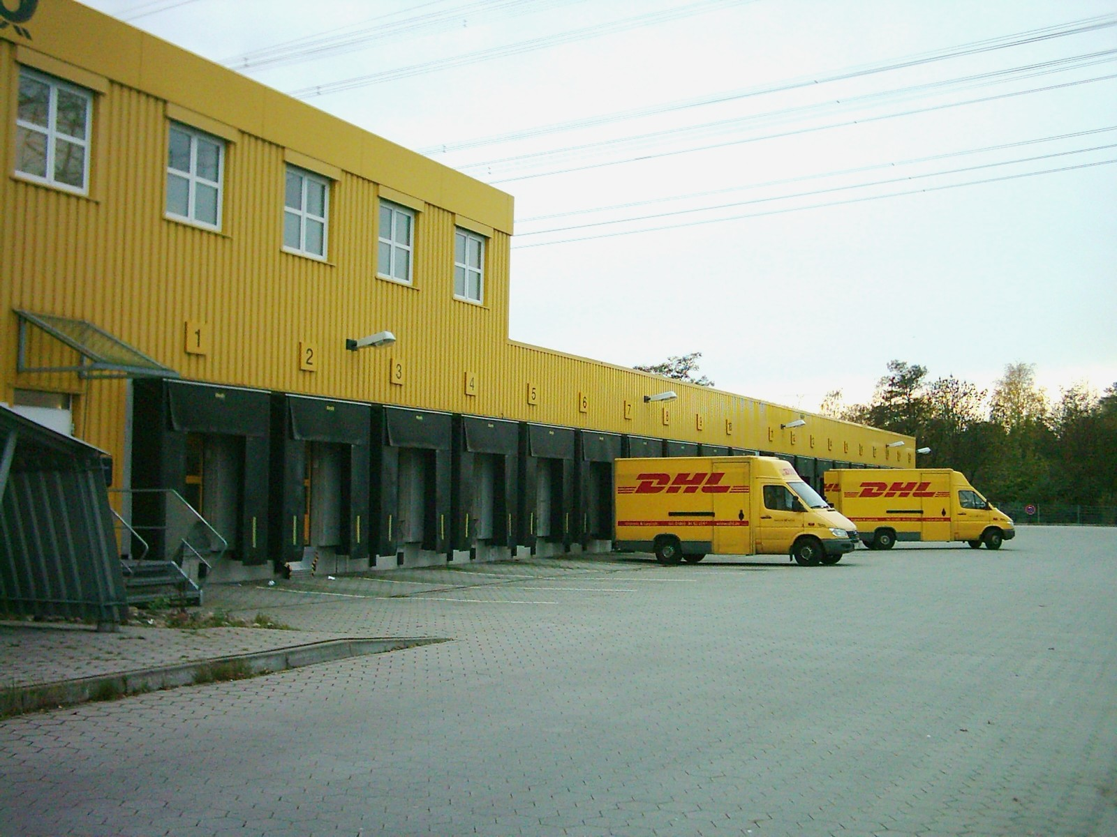 DHL Packlager, Hamburg-Rahlstedt, Gewerbegebiet Höltigbaum.